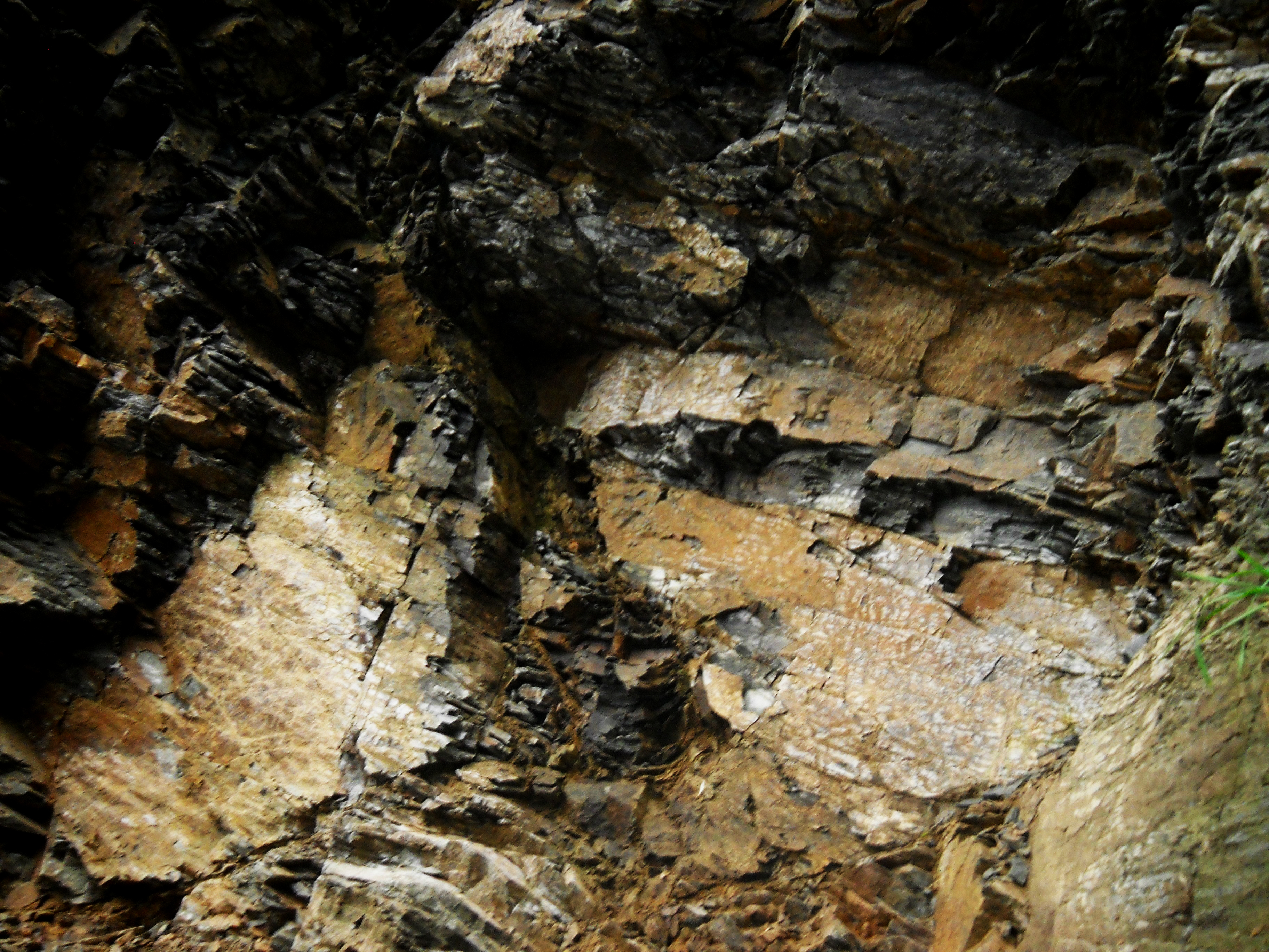 Praha-Hlubočepy, přírodní památka Železniční zářez. Pohled od trati na odkrytý geologický profil.